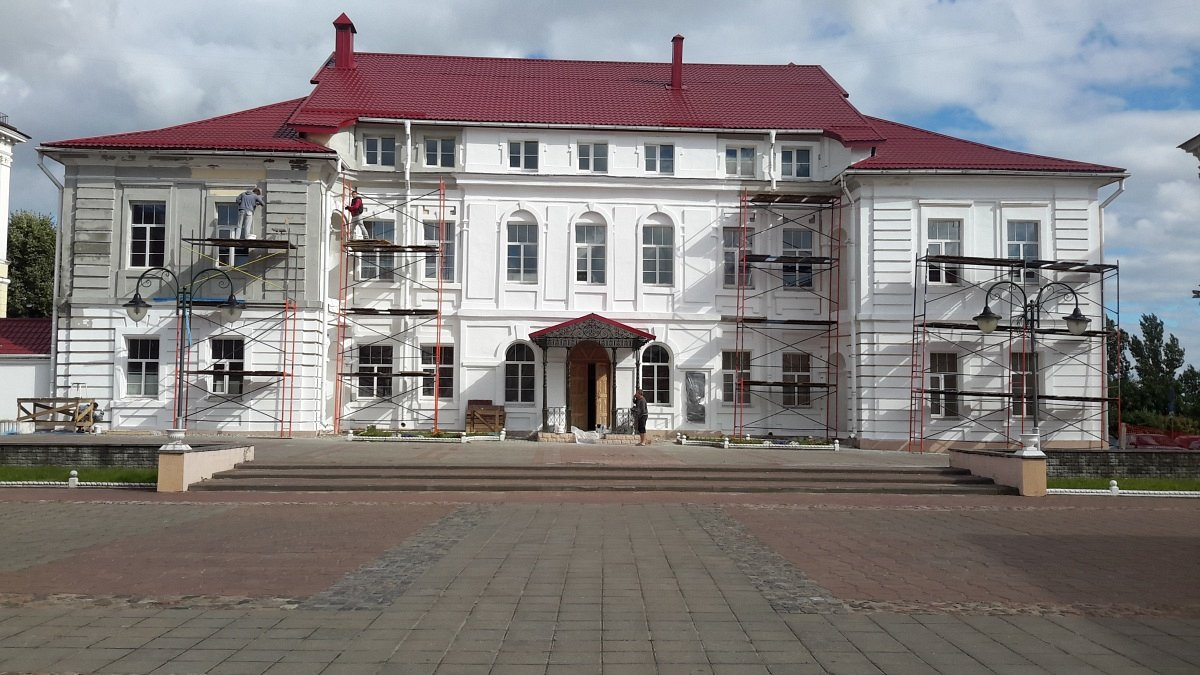 Магілёў. Палац архірэя Георгія Каніскага